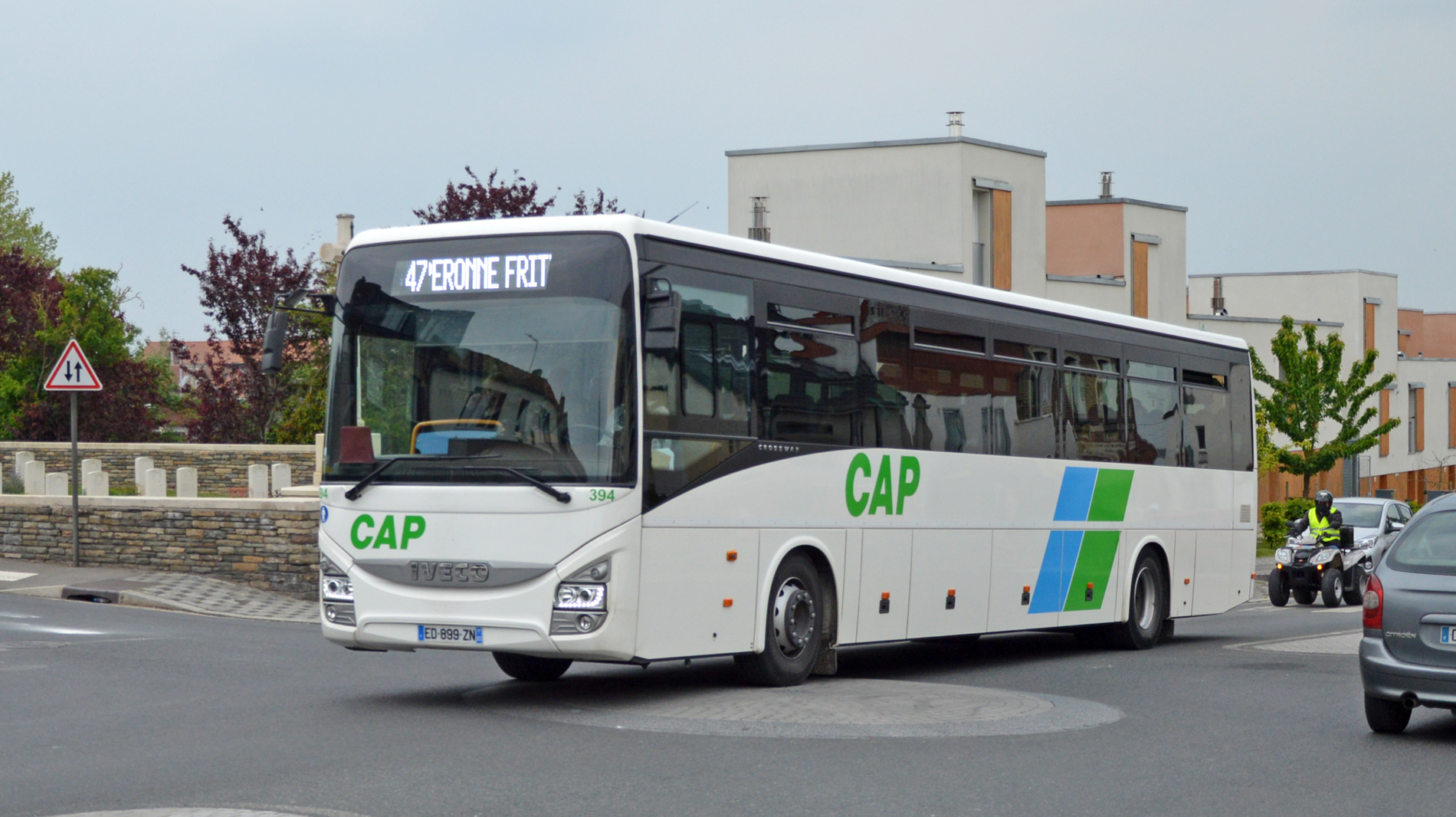 Car du réseau Trans'80, de la ligne 47 dans la traversé de Longueau